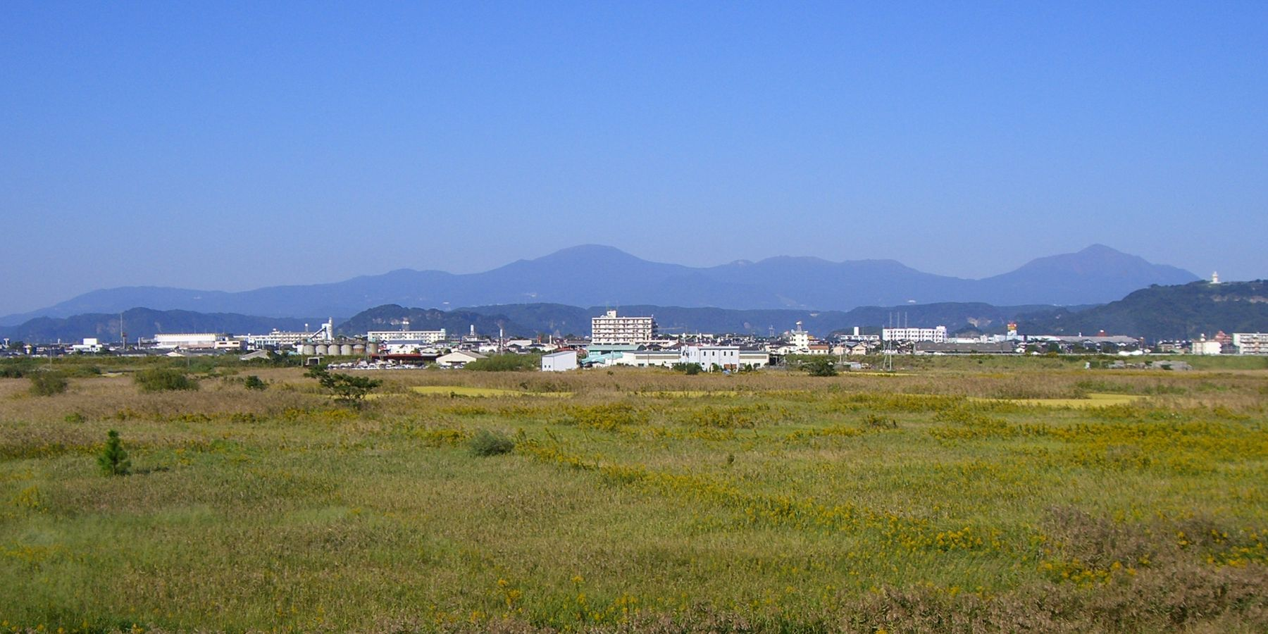 Kirishima Mountains in Kirishima City, Kagoshima, Japan.(鹿児島県の霧島山、シラス台地、および国分平野。霧島市国分広瀬付近にて撮影。)